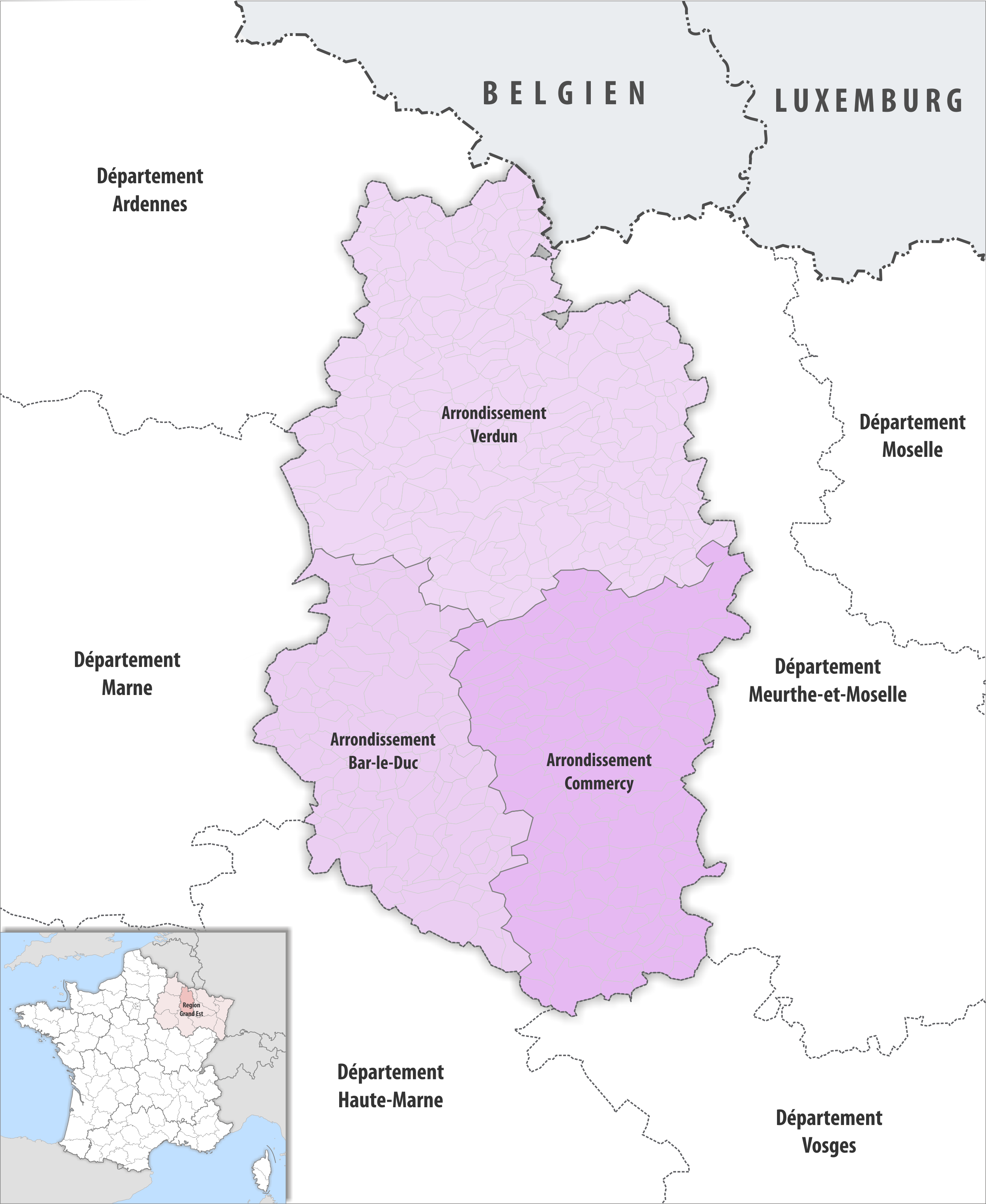 Gemeinden und Arrondissemente im Departement Meuse